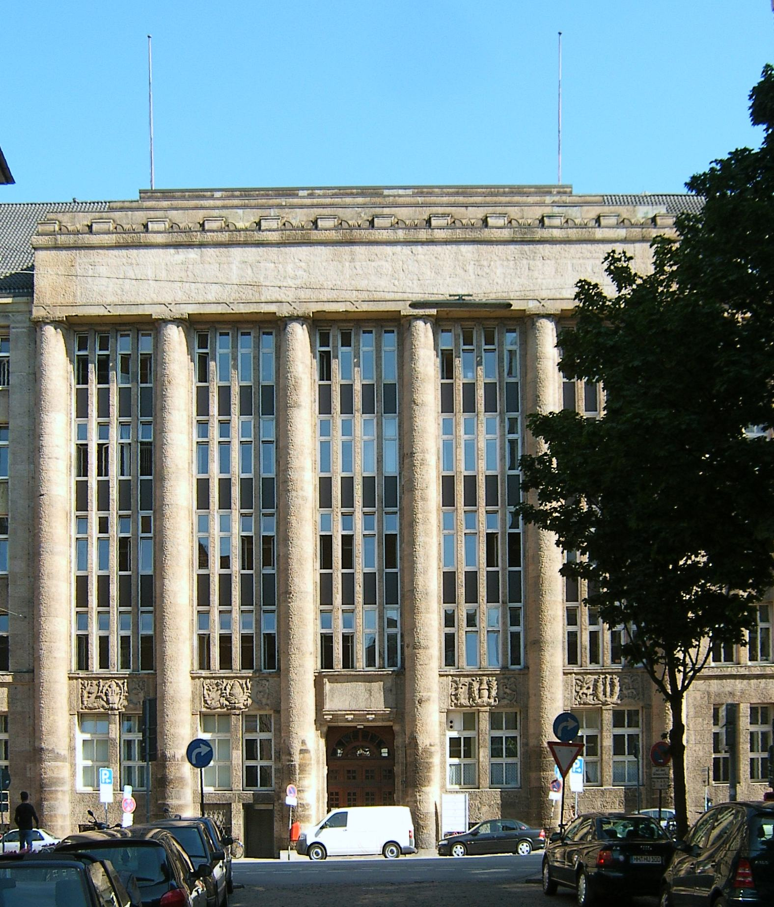 Die ehemalige Hauptverwaltung des Karstadt-Konzerns in der Steinstraße in Hamburg-Altstadt, 1921 bis 1924 nach Plänen von Philipp Schäfer erbaut, beherbergt heute ein Finanzamt. This is a photograph of an architectural monument.